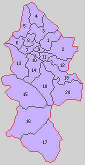 大分県日田郡の町村制時点の町村。